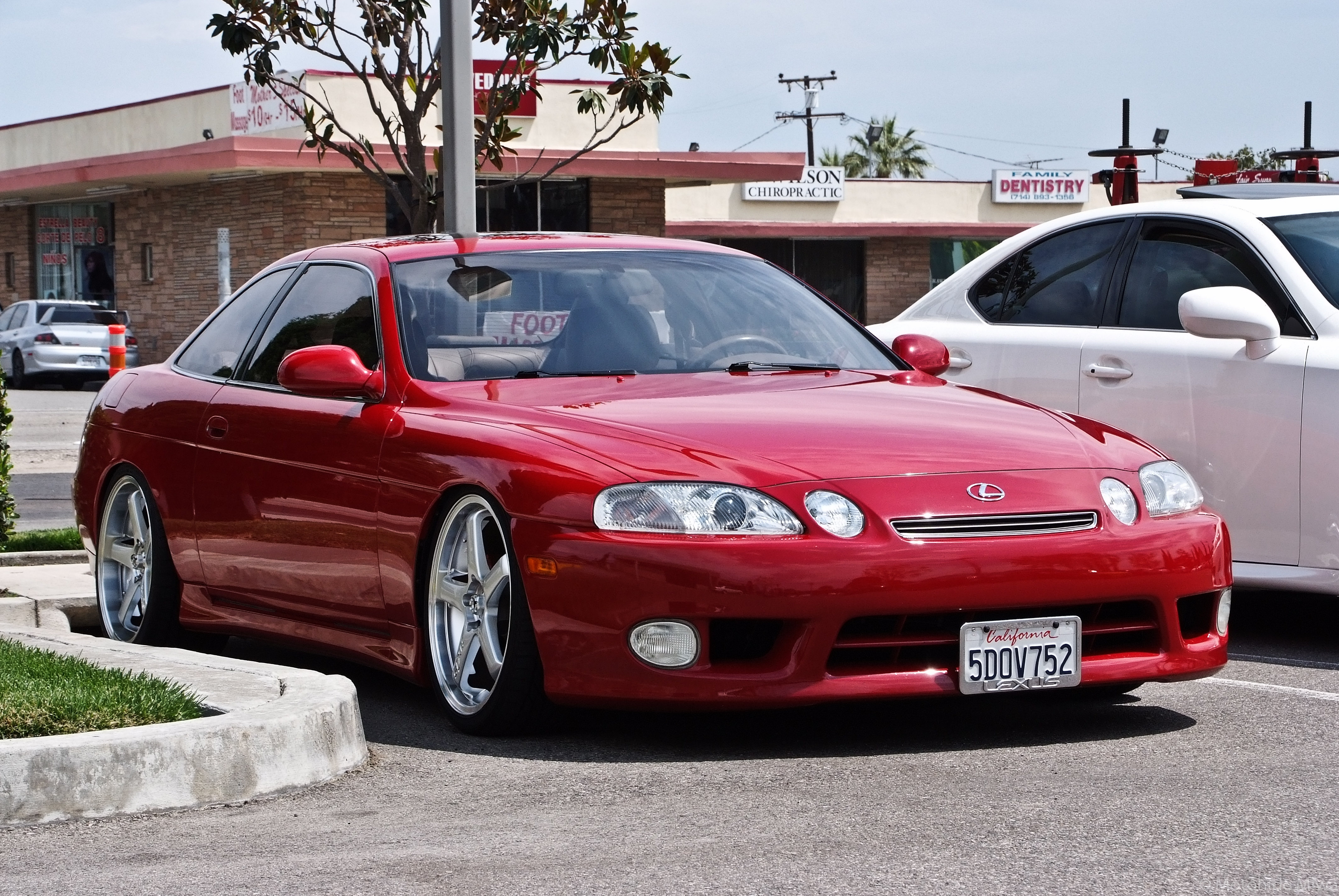 Lexus_Westminster_Meet-43